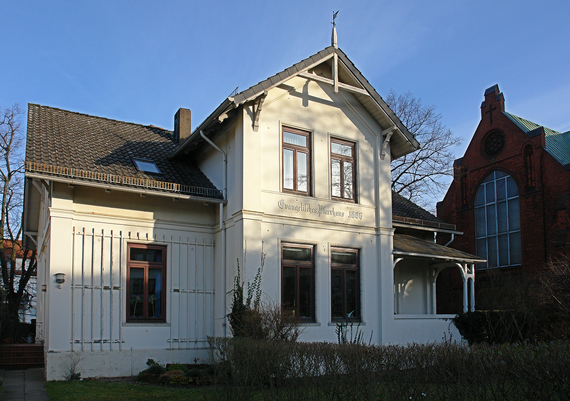 Ev. Kirche Hemelingen, Pfarrhaus (1886) in Bremen, Westerholzstraße 17. Das abgebildete Objekt ist ein geschütztes Kulturdenkmal in der Freien Hansestadt Bremen, mit der Nr. 1206 beim Landesamt für Denkmalpflege registriert.